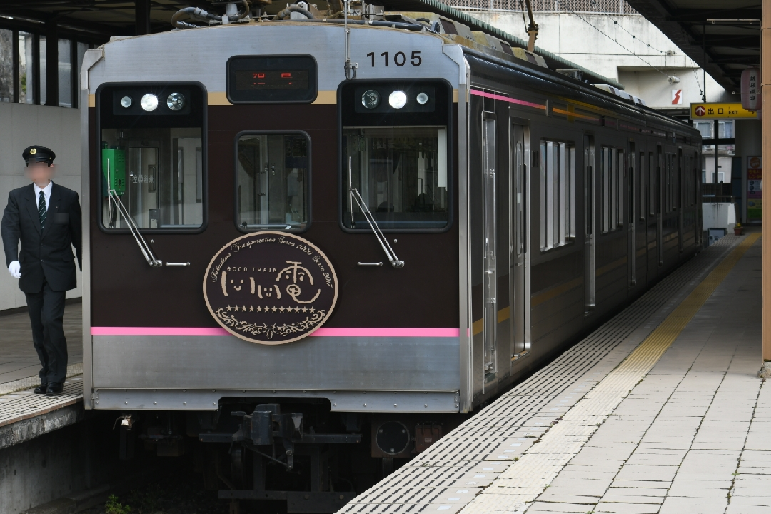 Cop: 福島交通1000系電車 運転士(モザイク処理済み)と共に飯坂温泉駅にて撮影